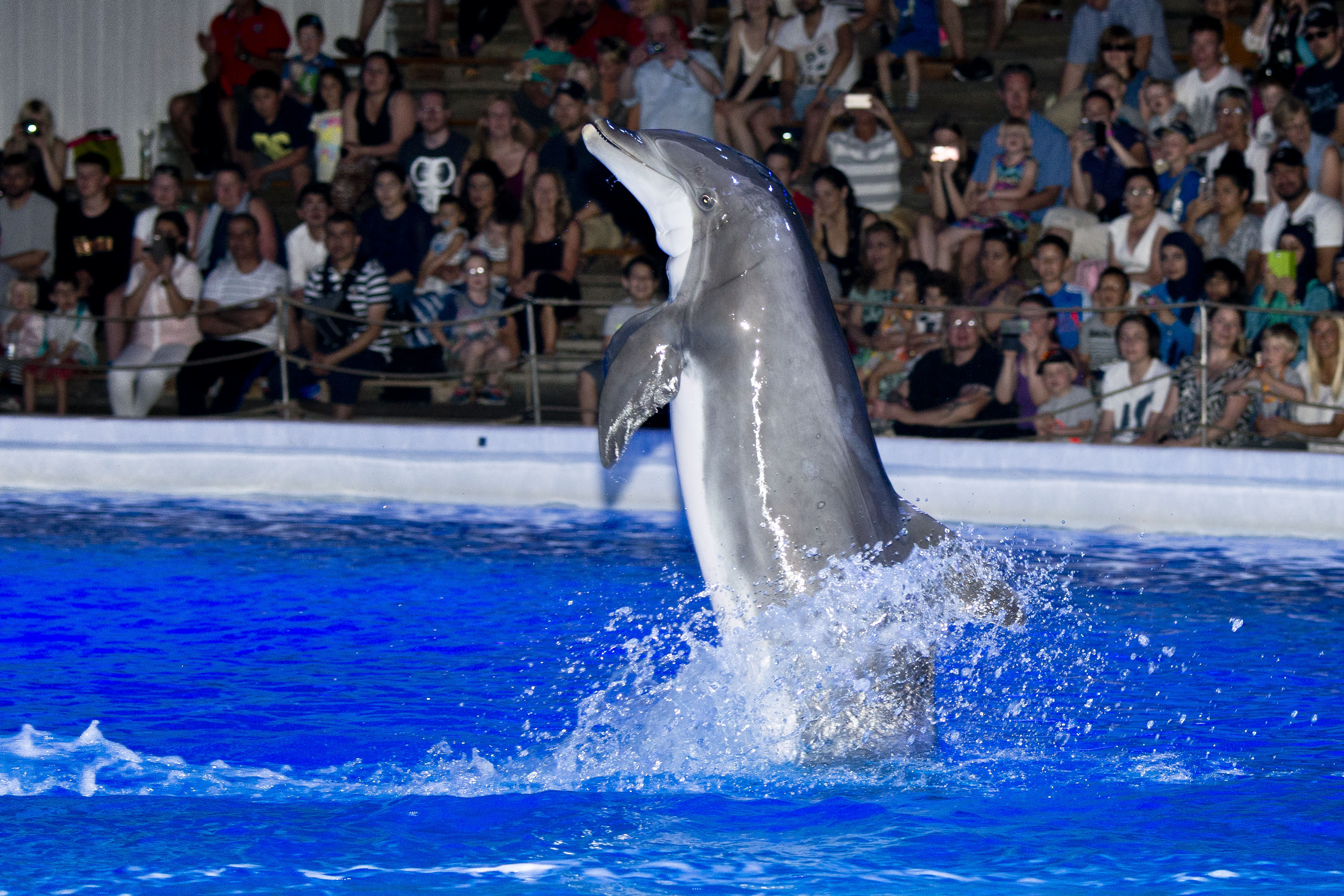 Kolmårdens Djurpark 2015, Delfin